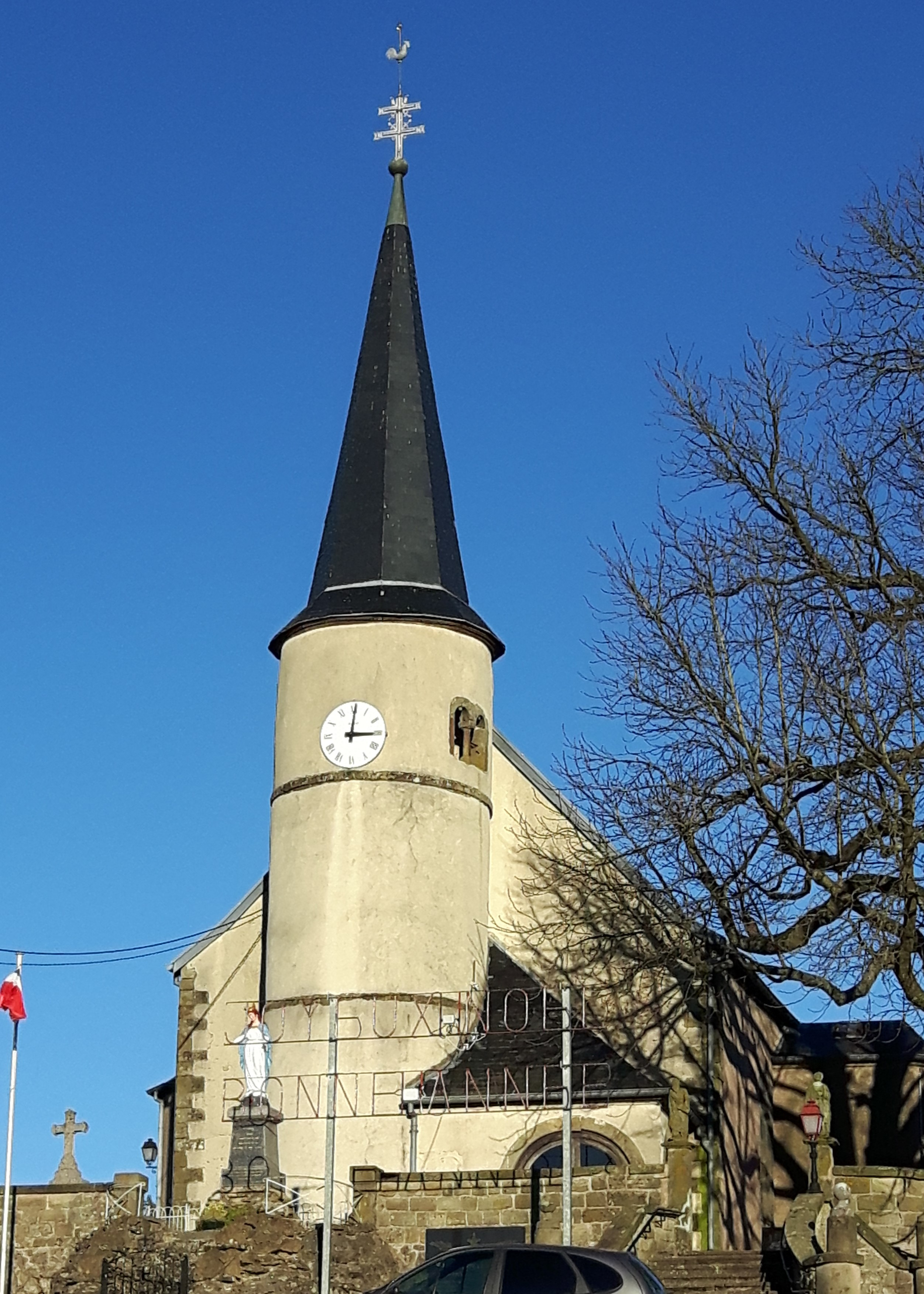 Vue de la façade de devant de l'Église Saint-Pierre.